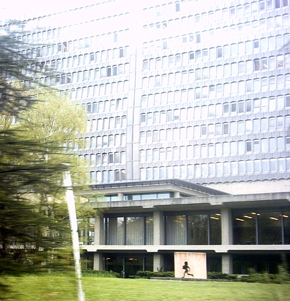 OIT. ILO. BIT. Sede de Ginebra. Geneve Headquarters